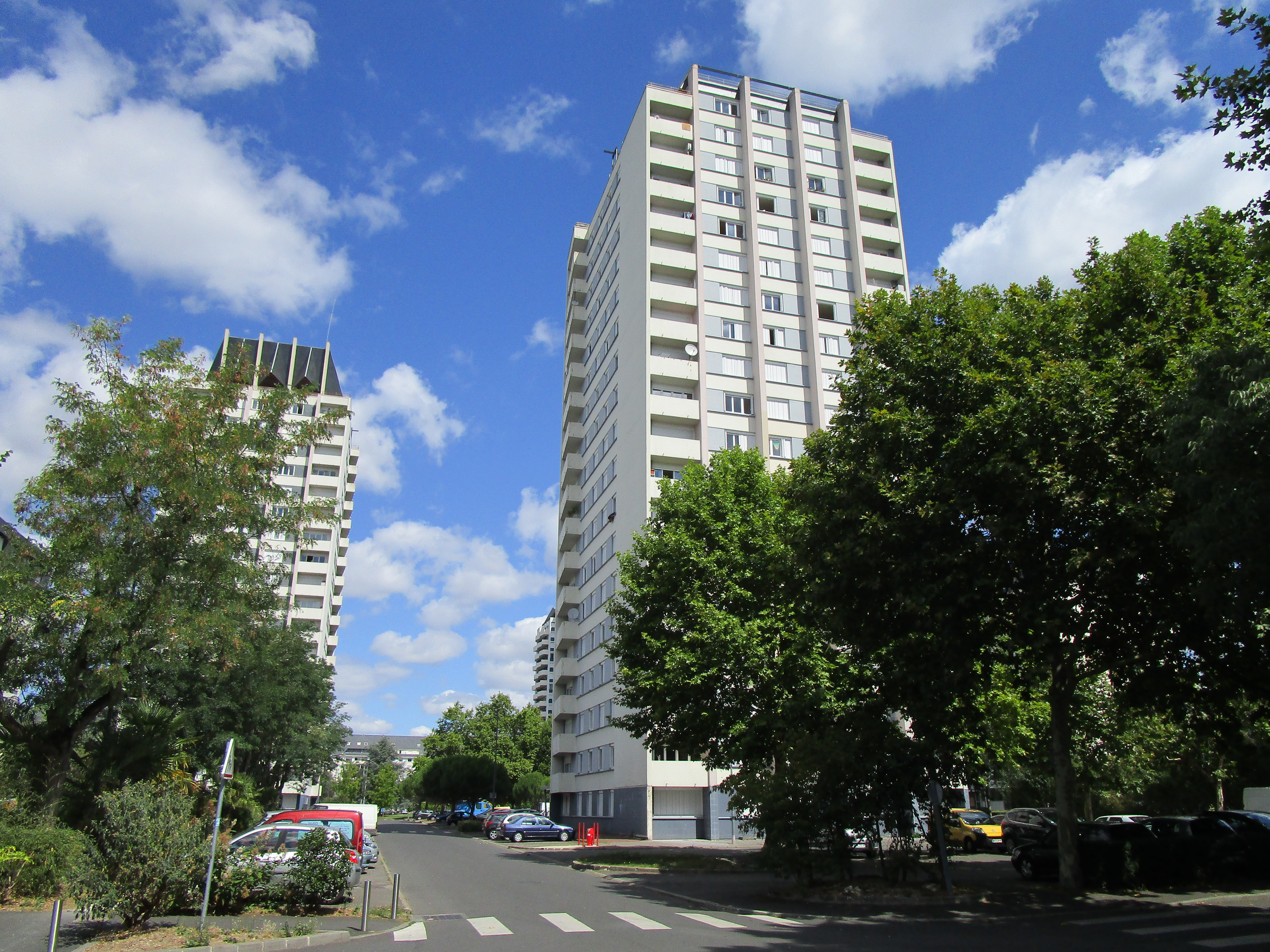 Vue de deux tours dans la partie est du quartier des Fontaines, à Tours, rue Johan Strauss.